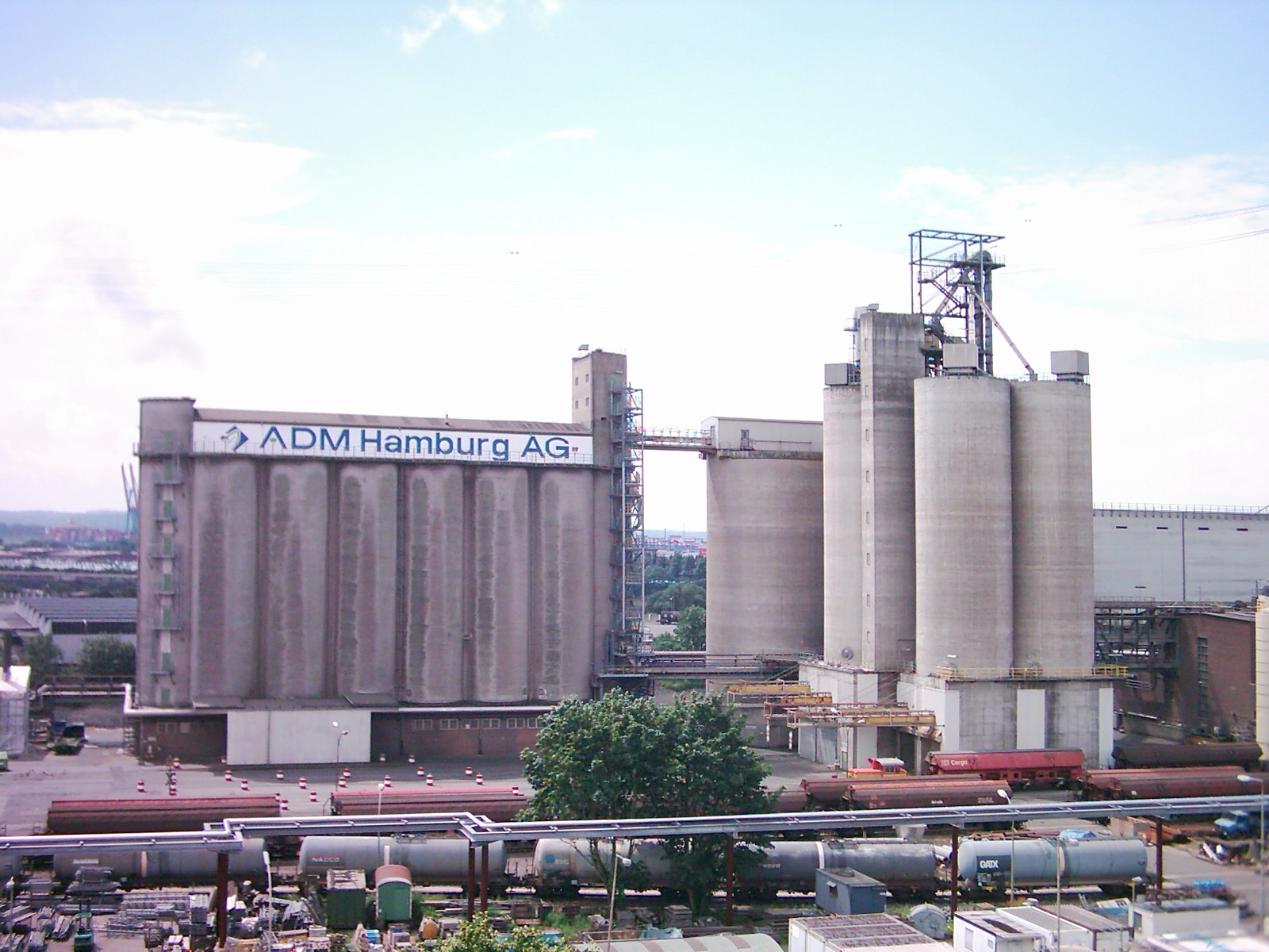 Die ADM Hamburg AG (vormals Oelmühle Hamburg AG) in Hamburg. Blick von der Köhlbrandbrücke, aufgenommen während der Fahrradsternfahrt am 17.06.07.